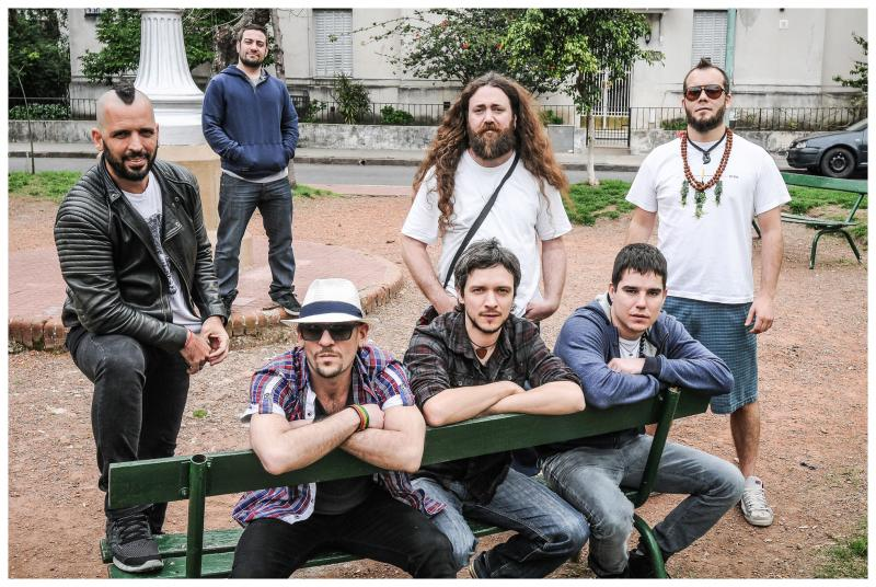 Estarán en el Papo Napolitano